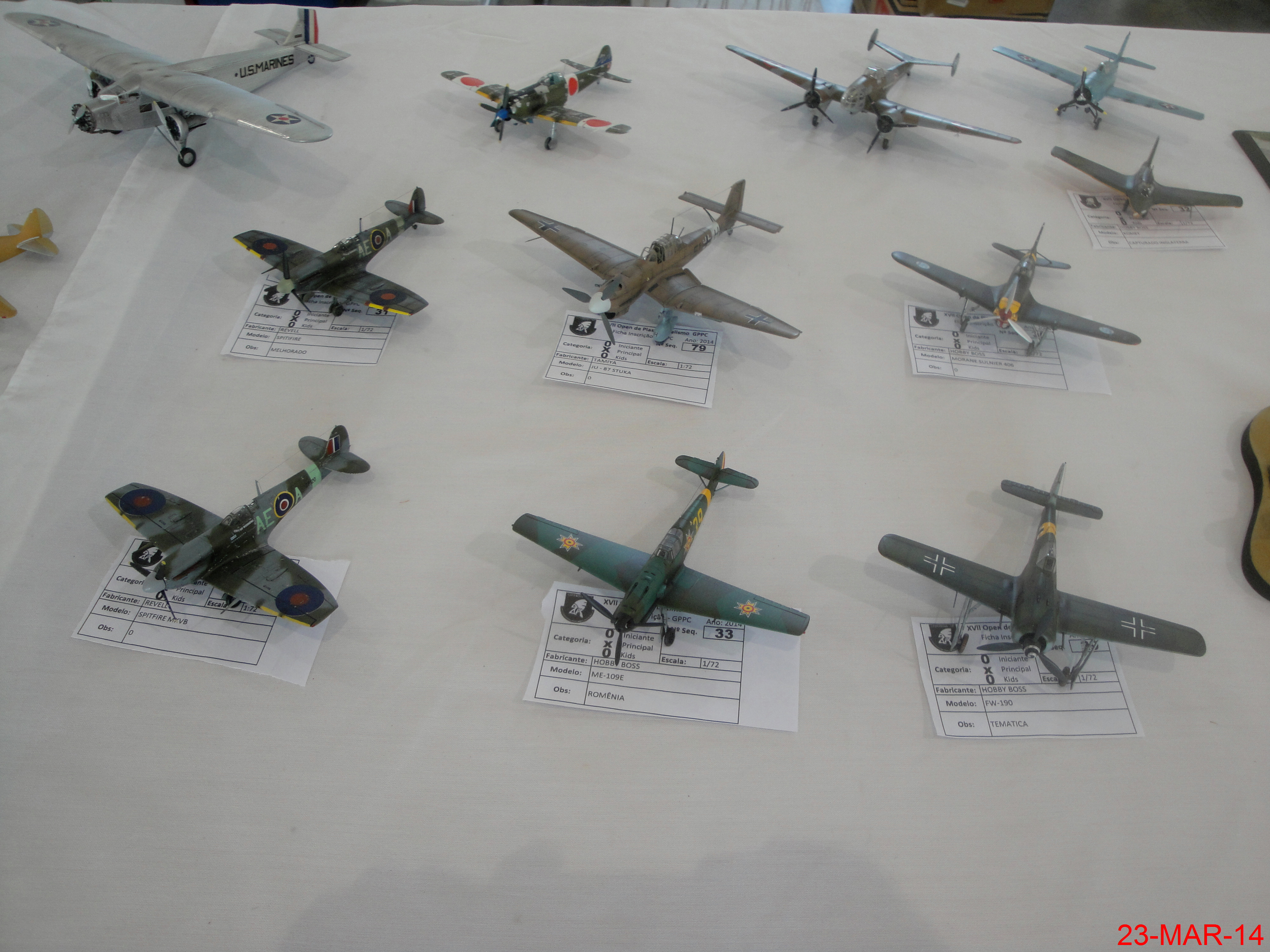 XVII Open de Plastimodelismo de Catanduva realizado no Espaço de Exposições da Estação Cultura em Catanduva.